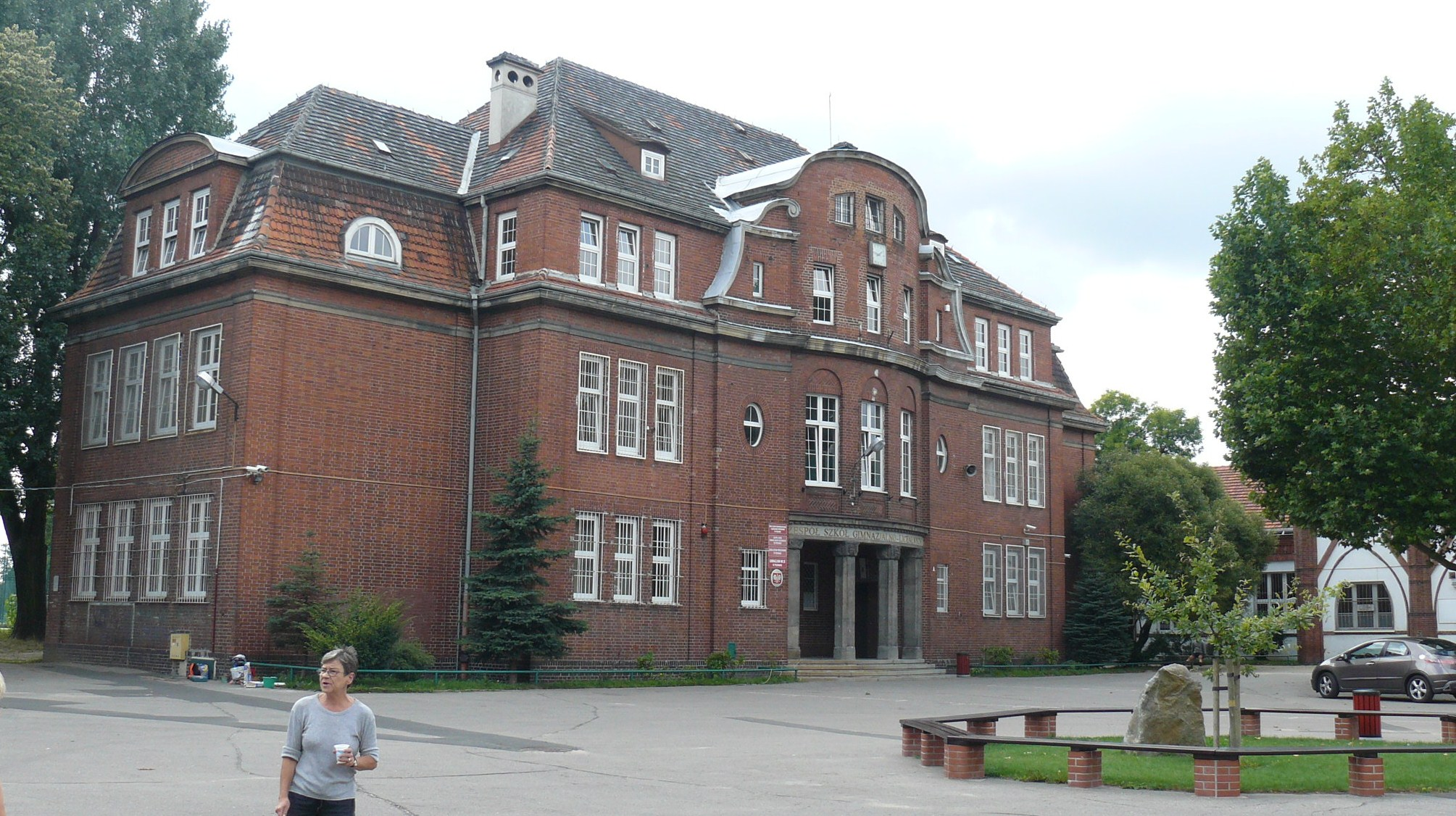 Poznań - Szkoła przy ul. Jarochowskiego (zabytek nr A 258).